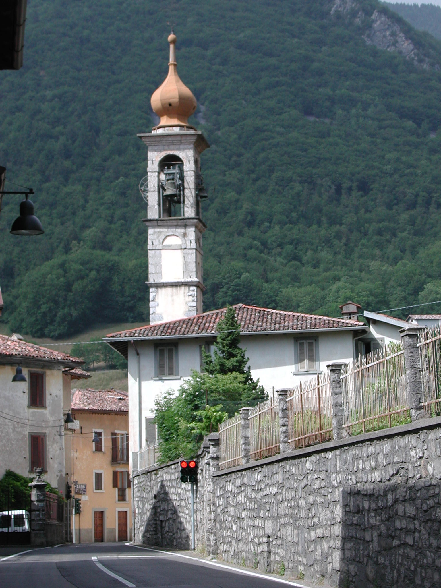 Val Seriana, Italy